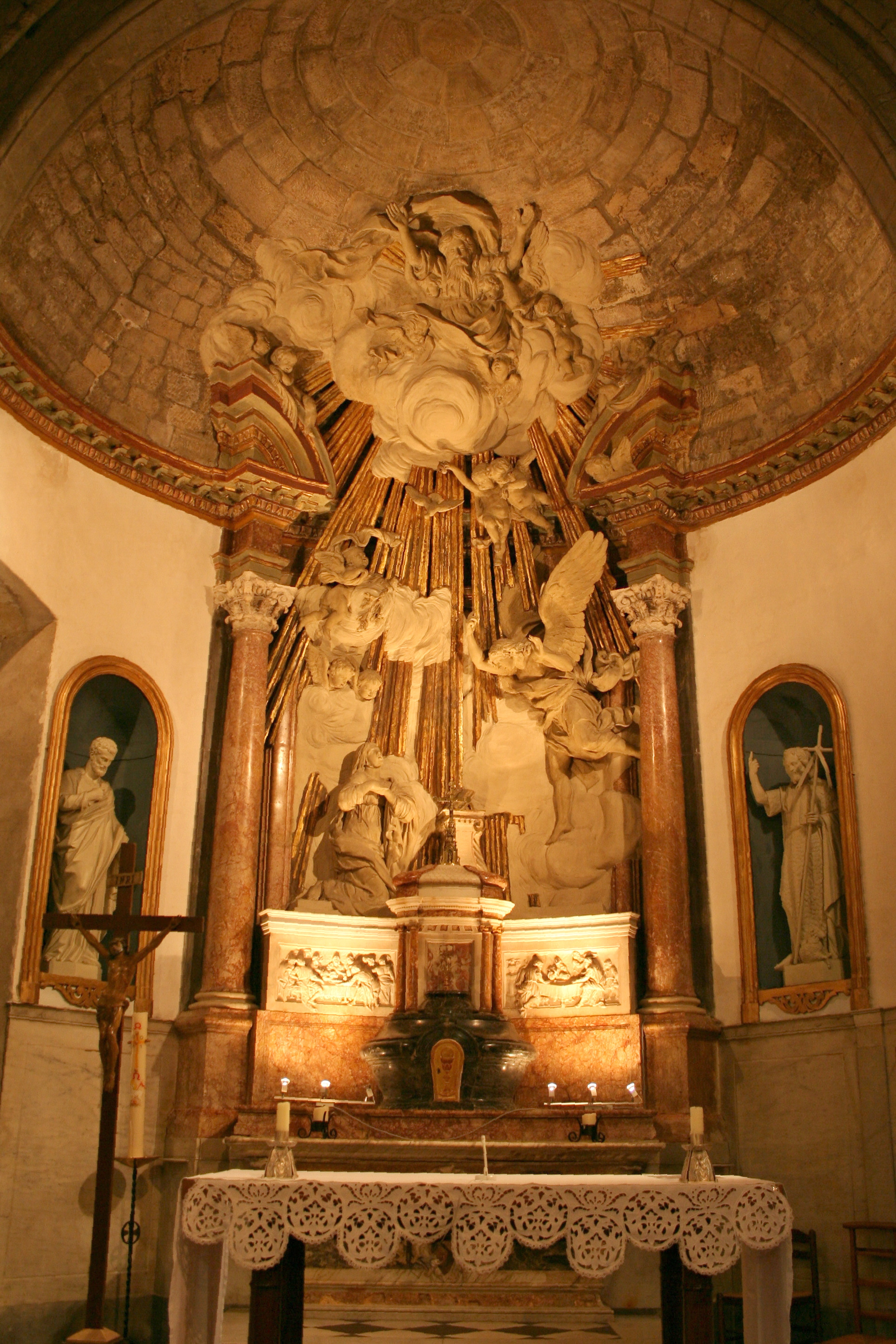 Trets (Bouches-du-Rhône, France), autel et retable de l'église Notre-Dame-de-Nazareth, sculptures de Christophe Veyrier.